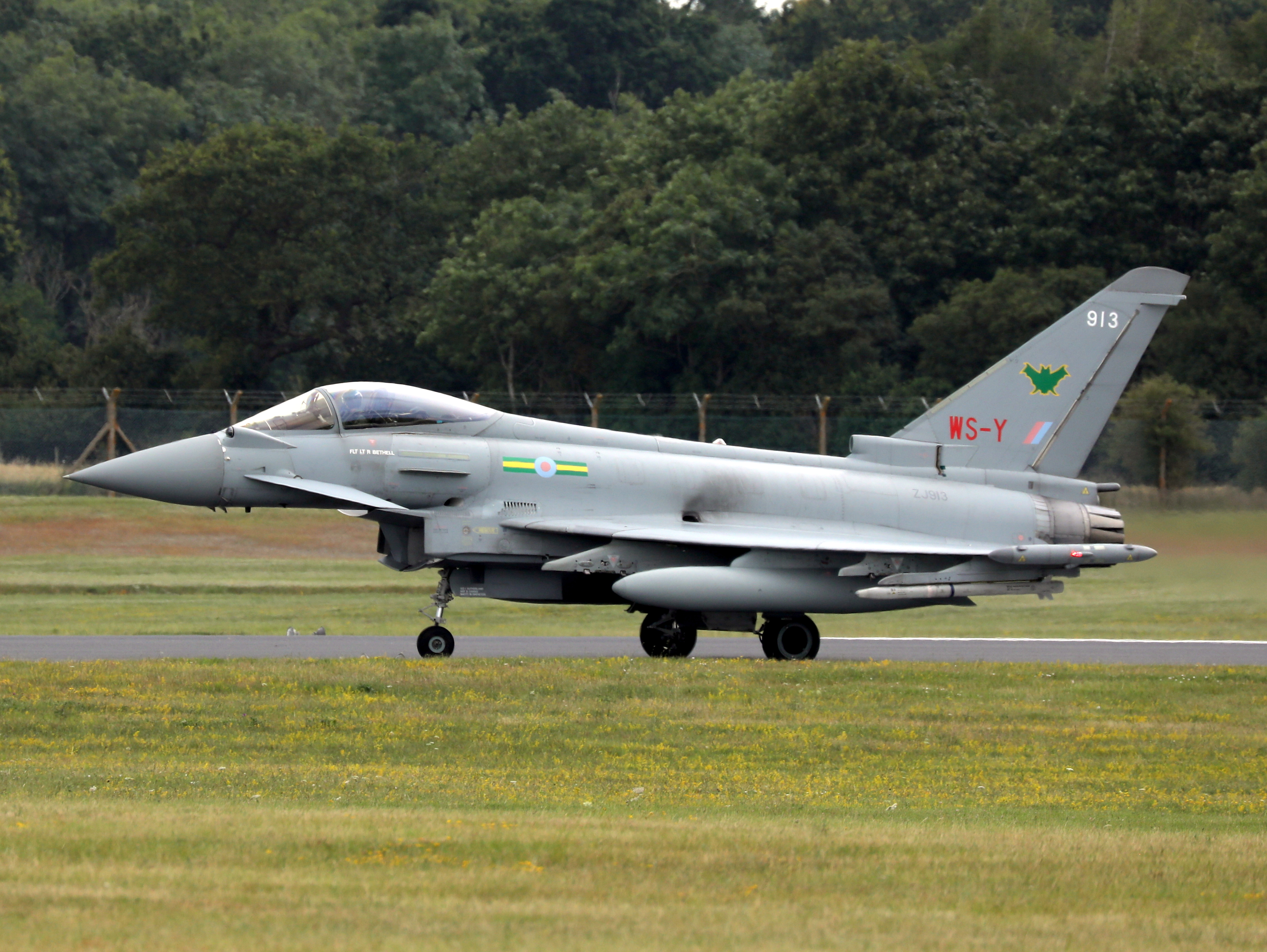 1P4A6215